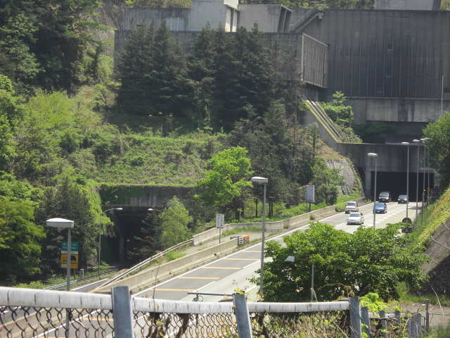 中央自動車道・笹子トンネル出口